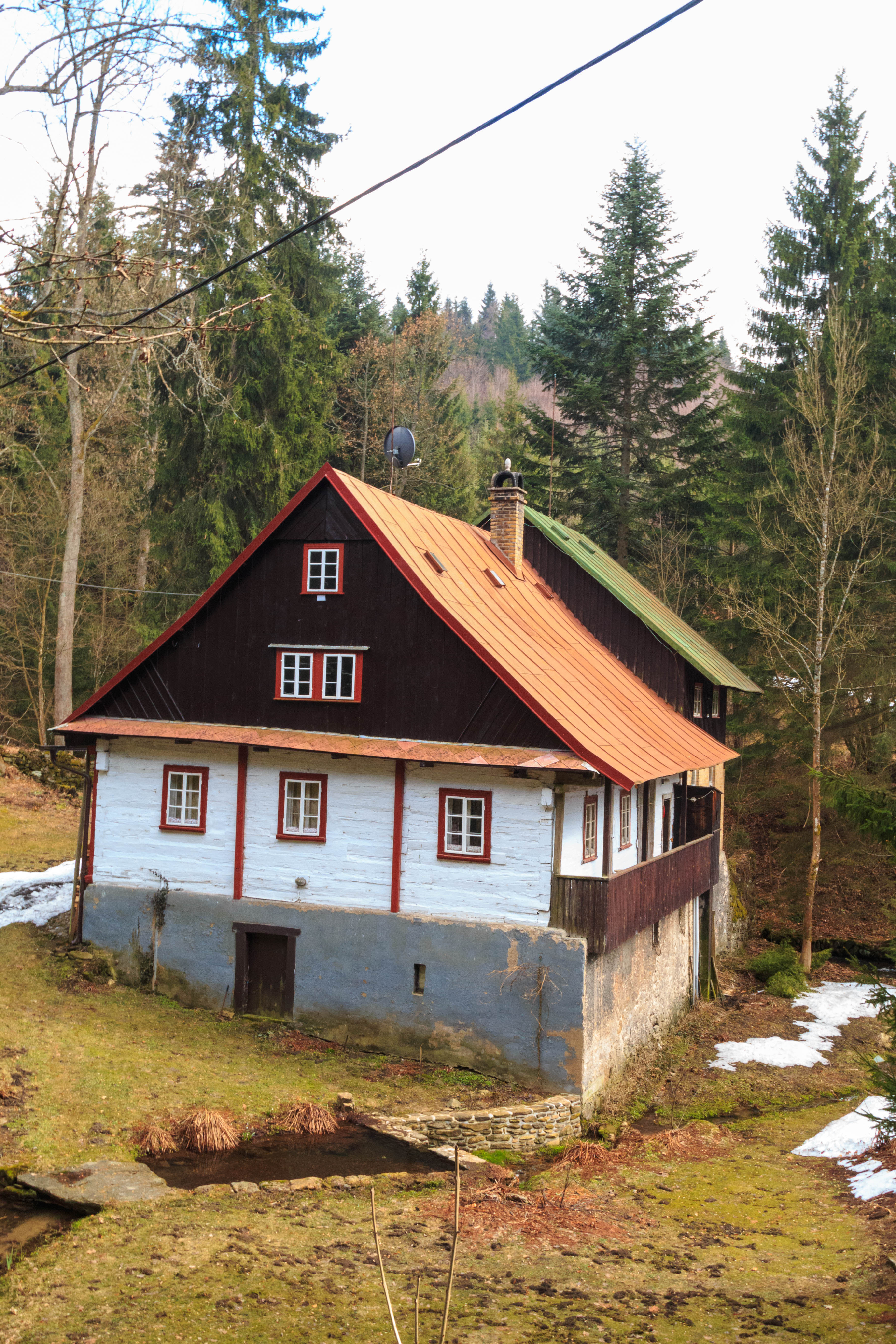 Polanka - eč. 55